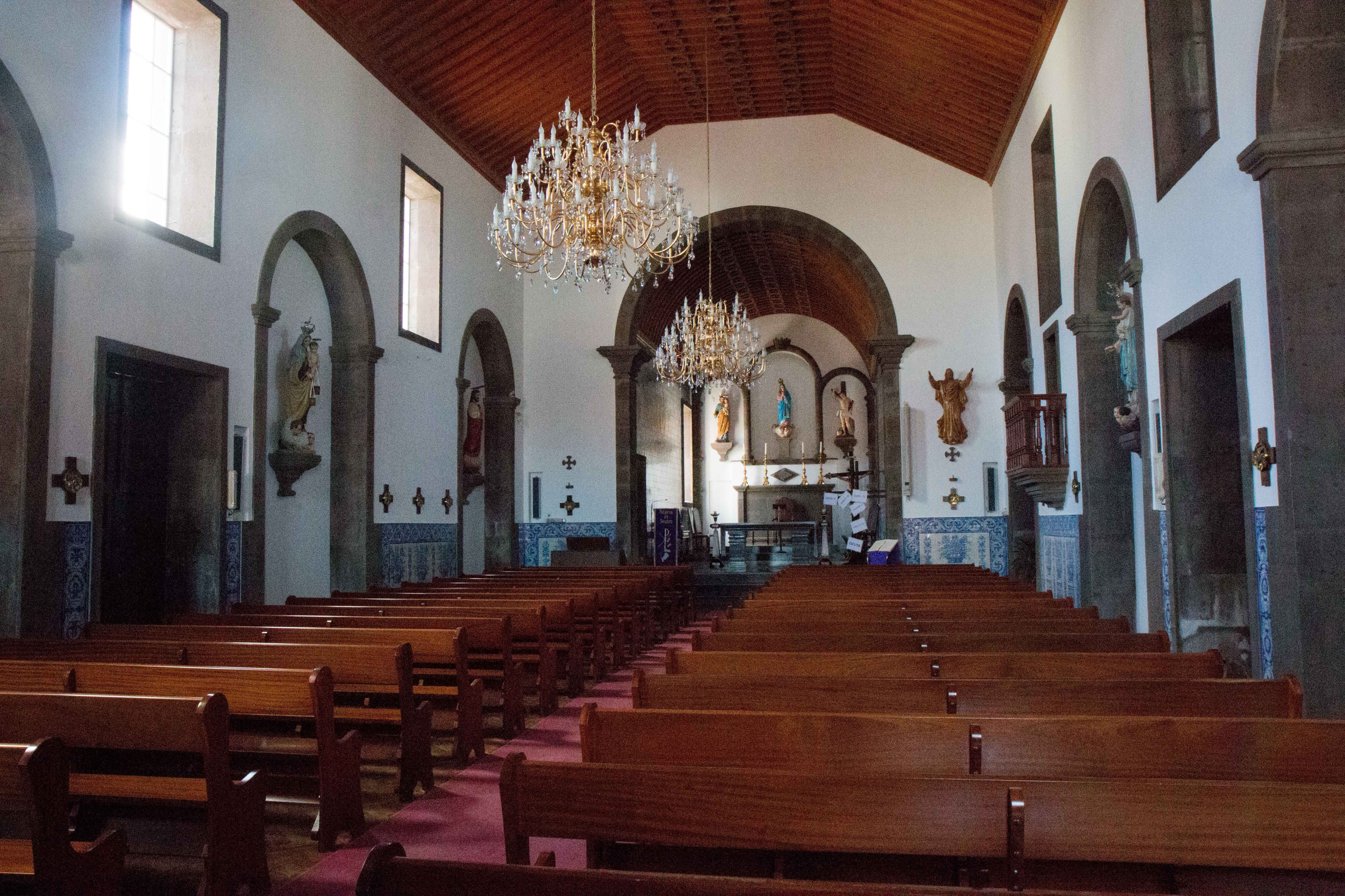 Interior da Igreja de Nossa Senhora da Pena